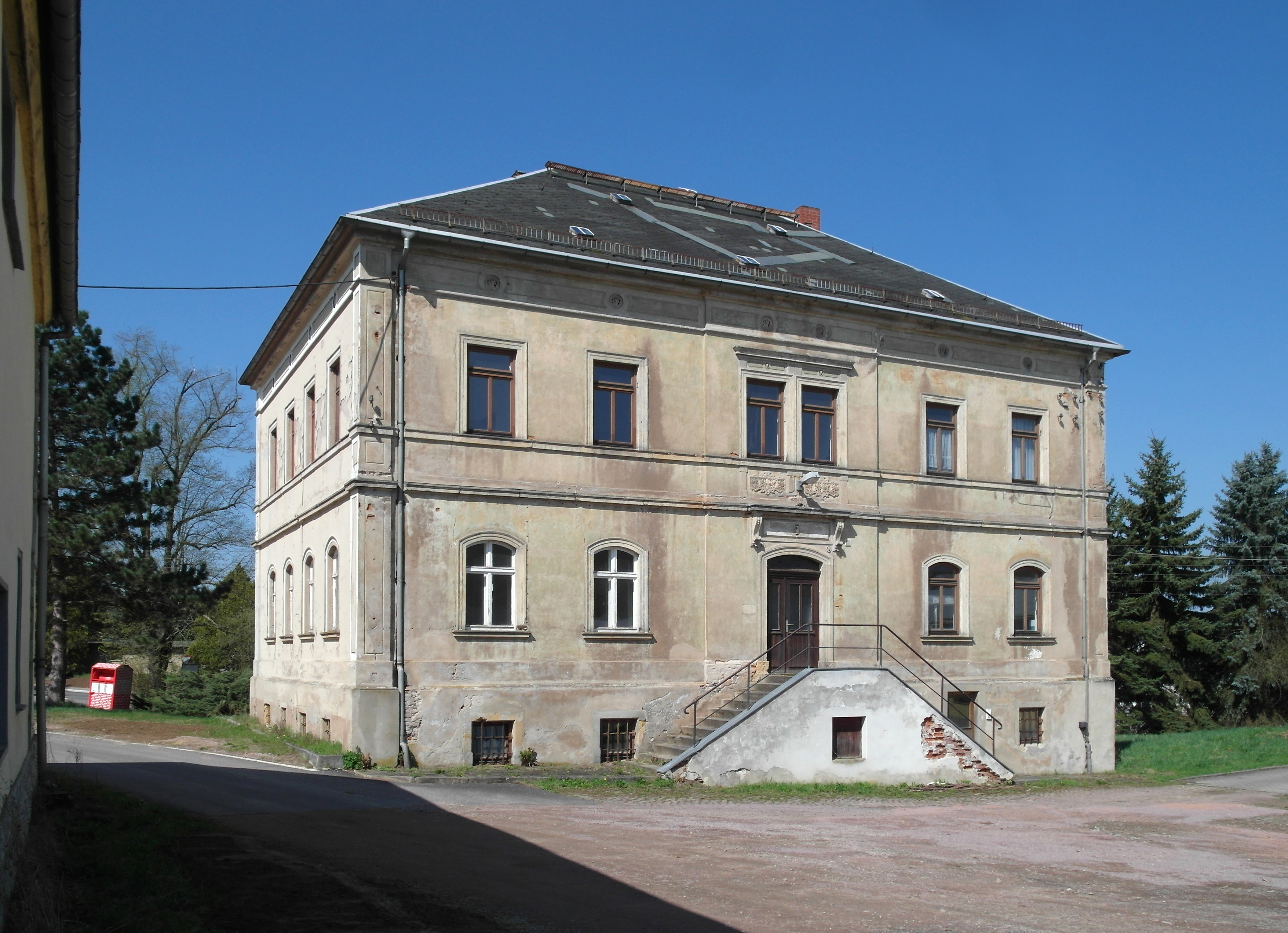 18.04.2018 09661 Böhrigen (Striegistal), Hanichener Straße 1: Rittergut Böhrigen, Herrenhaus (GMP: 51.030600,13.159283). [SAM5316.JPG]20180418155DR.JPG(c)Blobelt